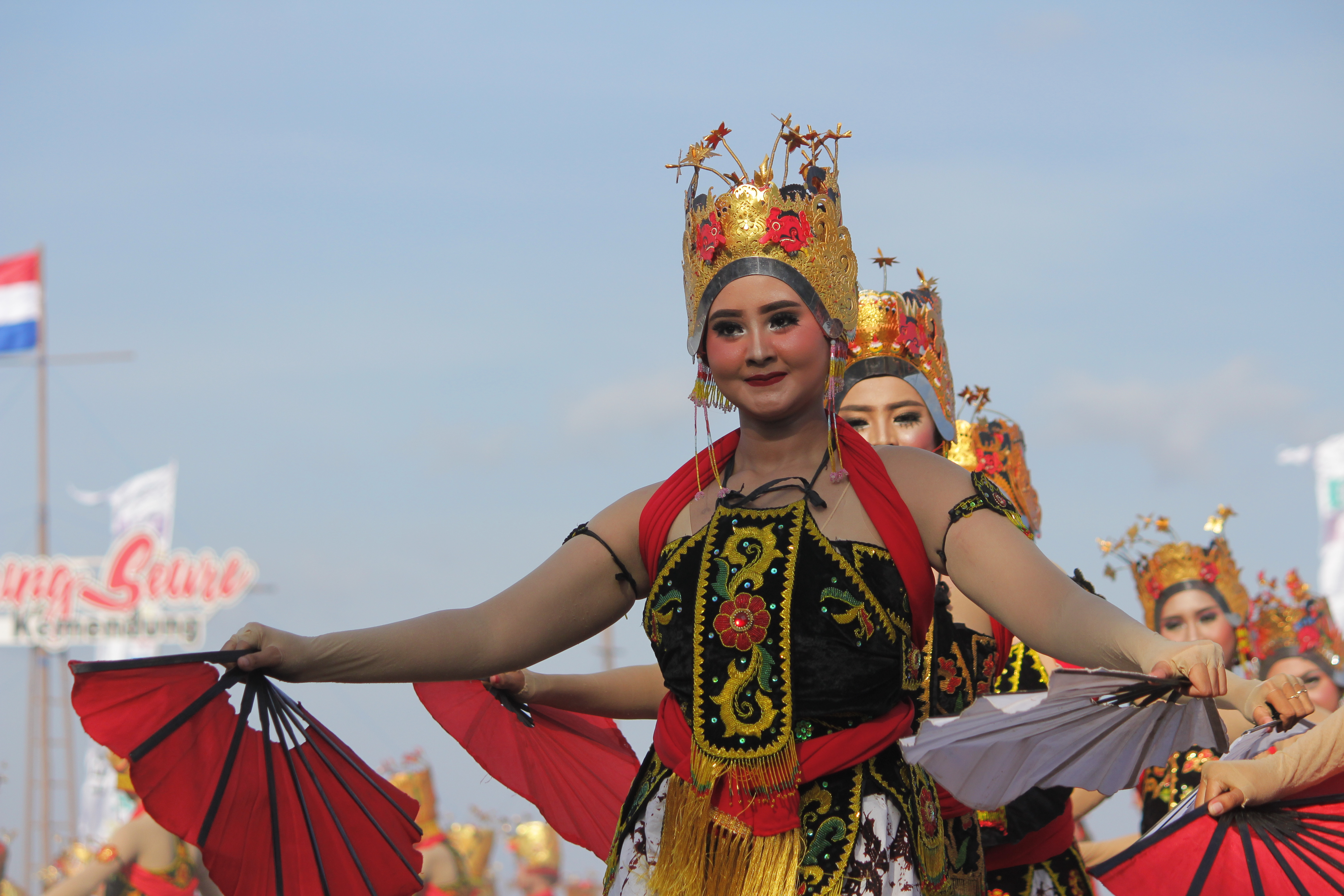 Gandrung Sewu Adalah Festival Tarian Kolosal yang setiap tahun diadakan di Banyuwangi dan menari dengan latar belakang Selat Bali